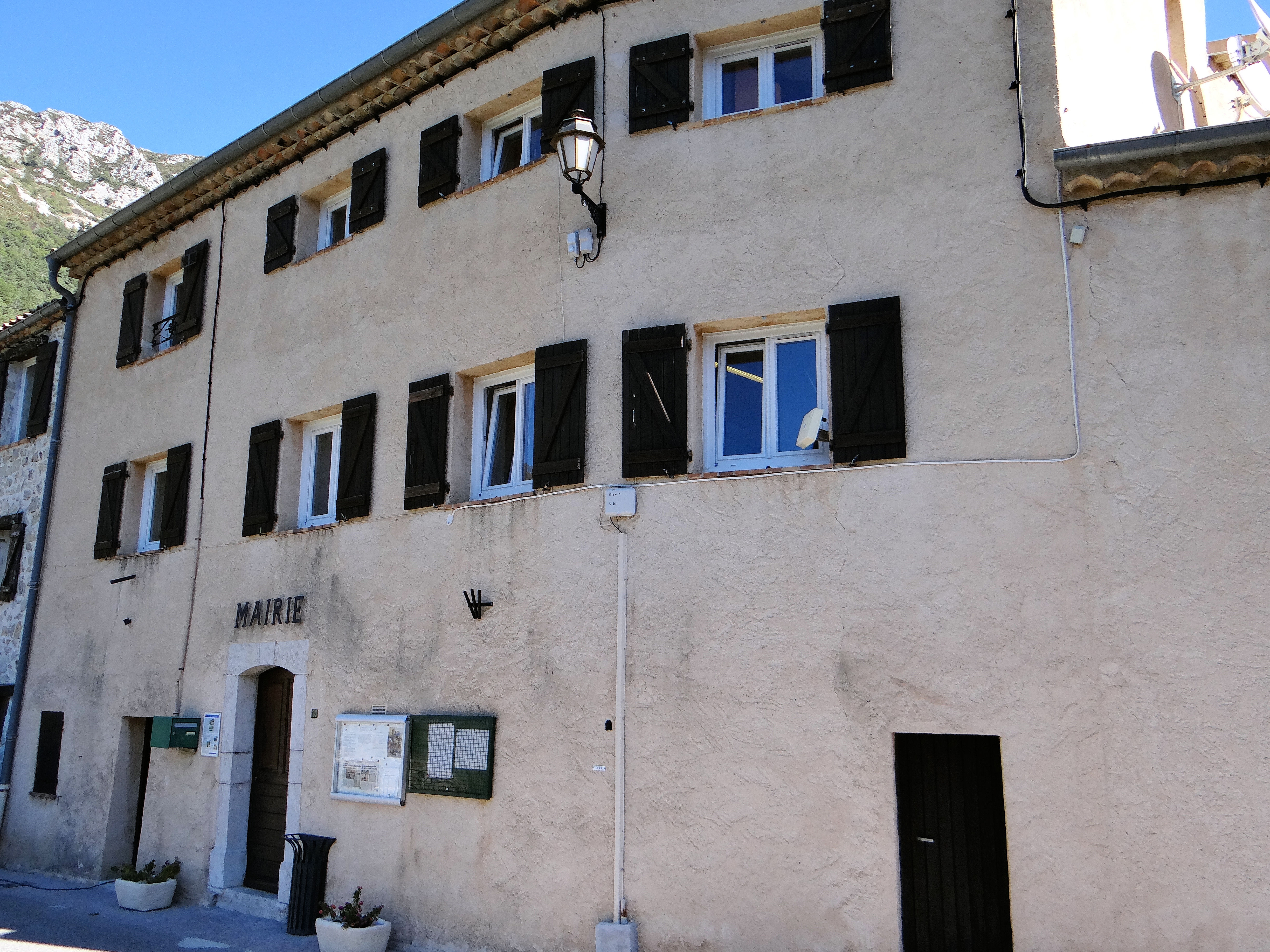 Le Mas - Mairie